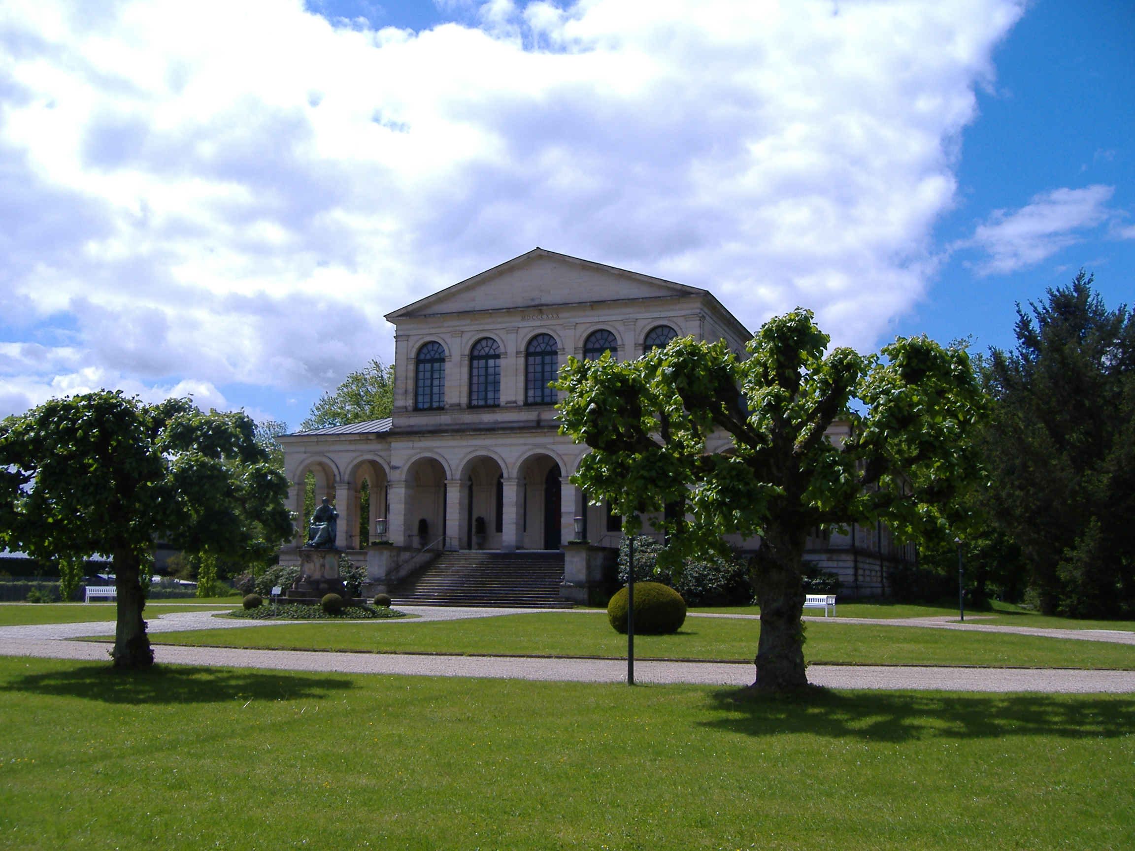 Kursaal Staatsbad Bad Brückenau